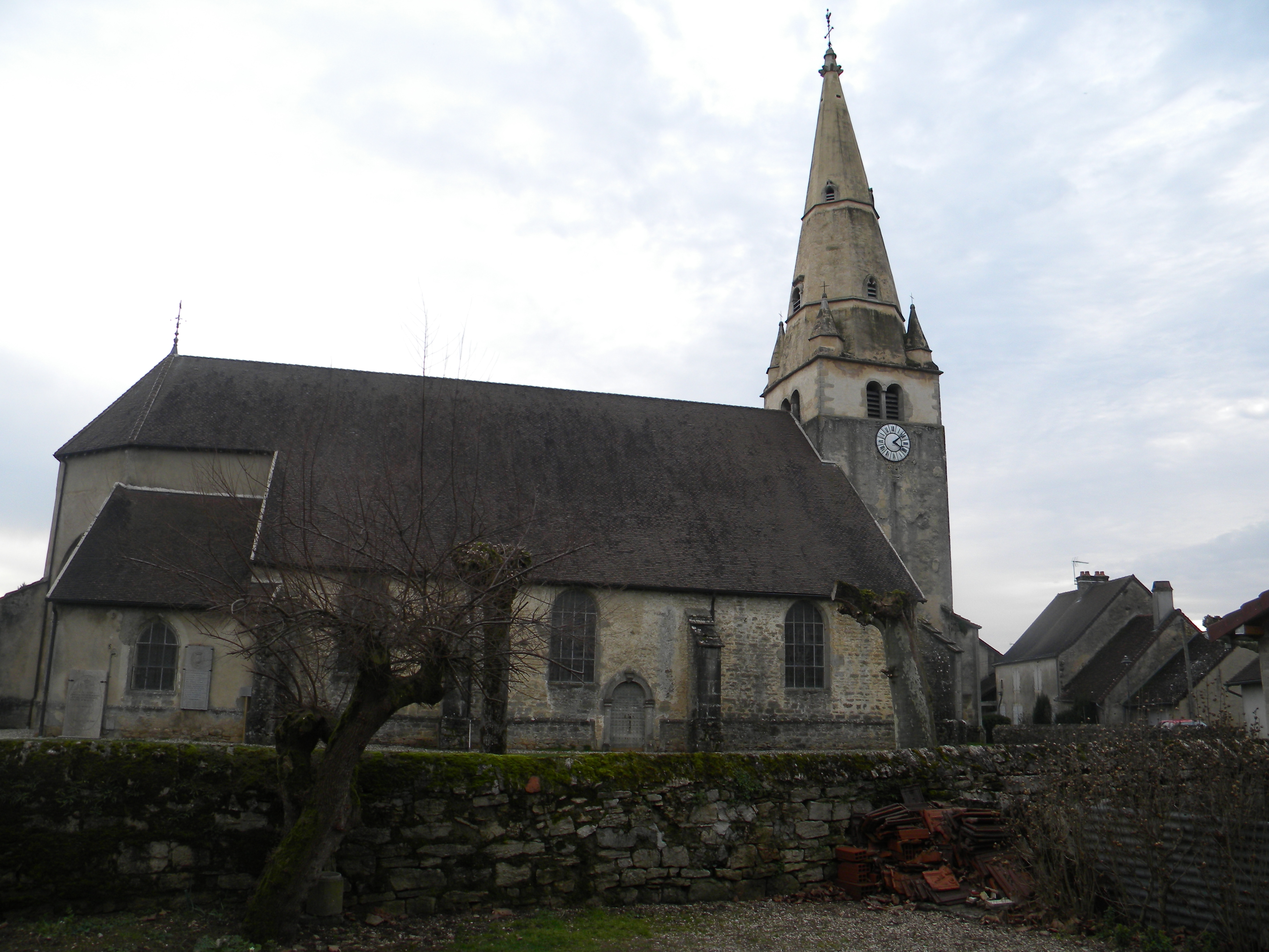 Preĝejo de Ruffey-sur-Seille